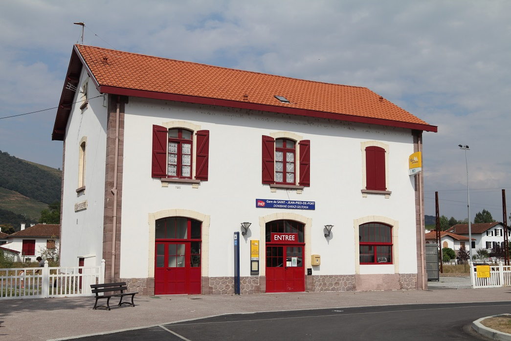 La gare de Saint-Jean-Pied-de-Port en août 2013, Aquitaine, France.